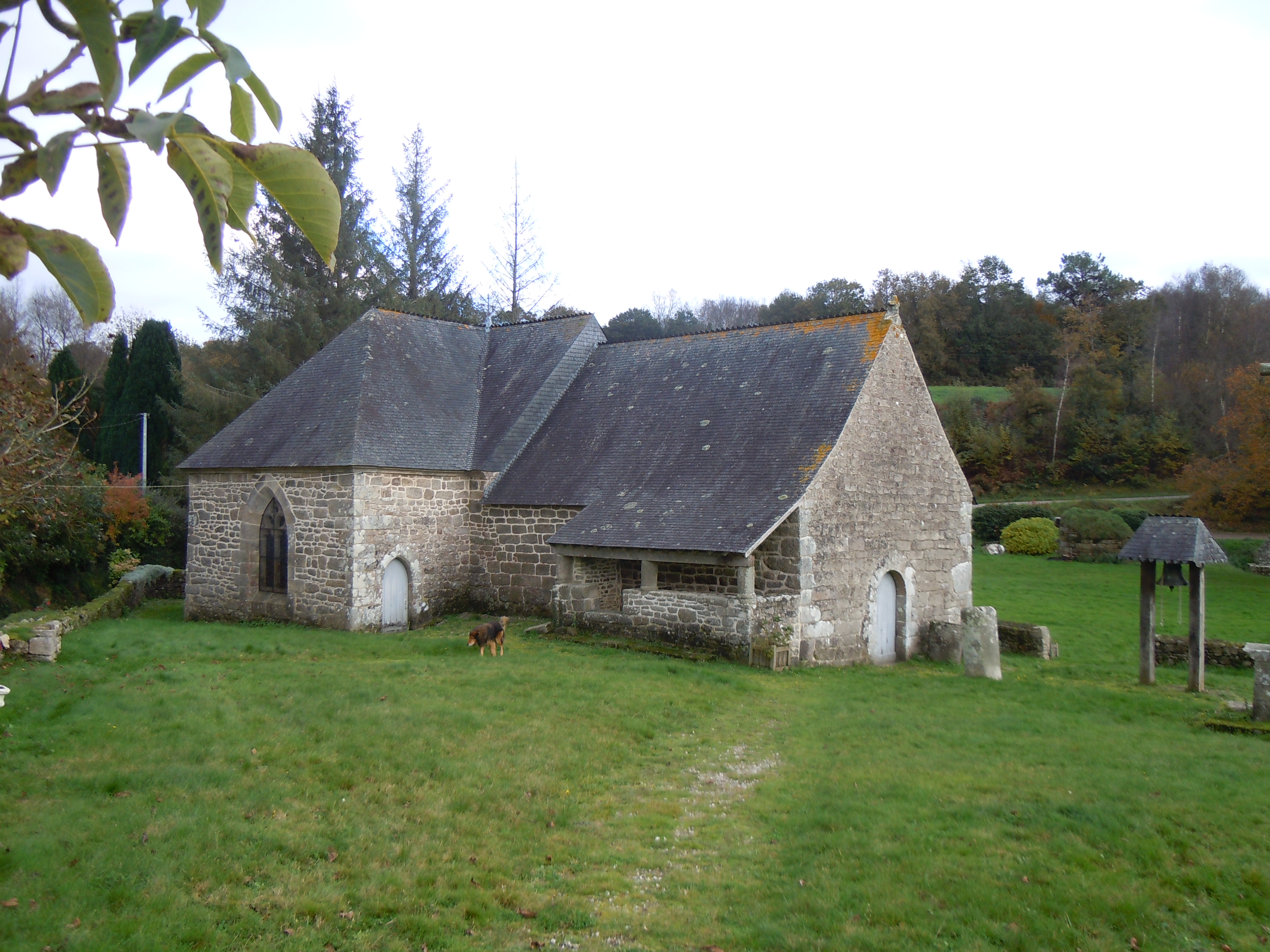 vue de la chapelle de Locmeltro et de l'une des deux bornes miliaires situées dans l'enclos (commune de Guern et département du Morbihan)